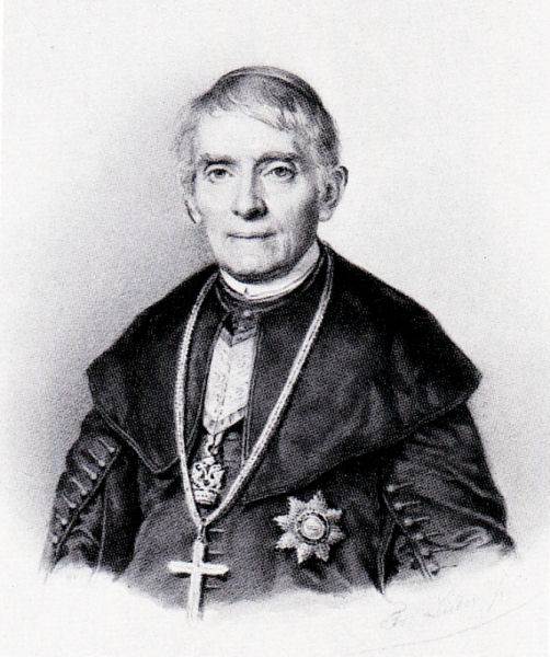 Pyrker János László egri érsek portréja (Friedrich Lieder tusrajza )